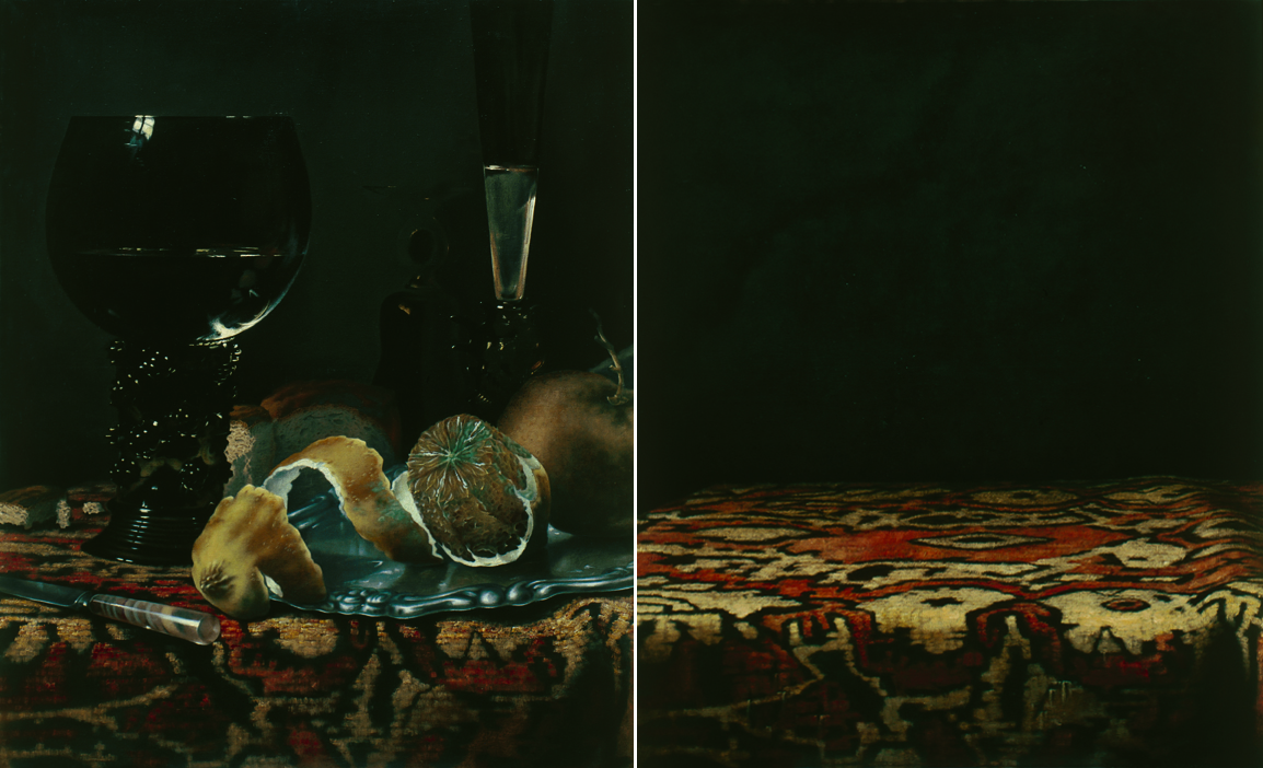 Martin Velíšek, Zátiší s plesnivým citronem a Zátiší bez citronu, 1993, olej na plátně, každý obraz 150 x 125 cm